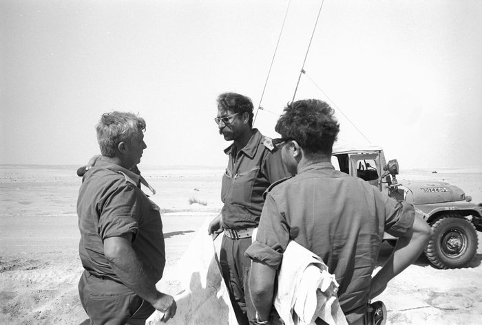 הצגת תוכניות ע”י ה-מח”ט למפקד האוגדה למבצע “אבירי לב”.